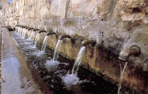 La fuente de Muro de Aguas (La Rioja, España), de más cerca, en la que se ve el pilón.